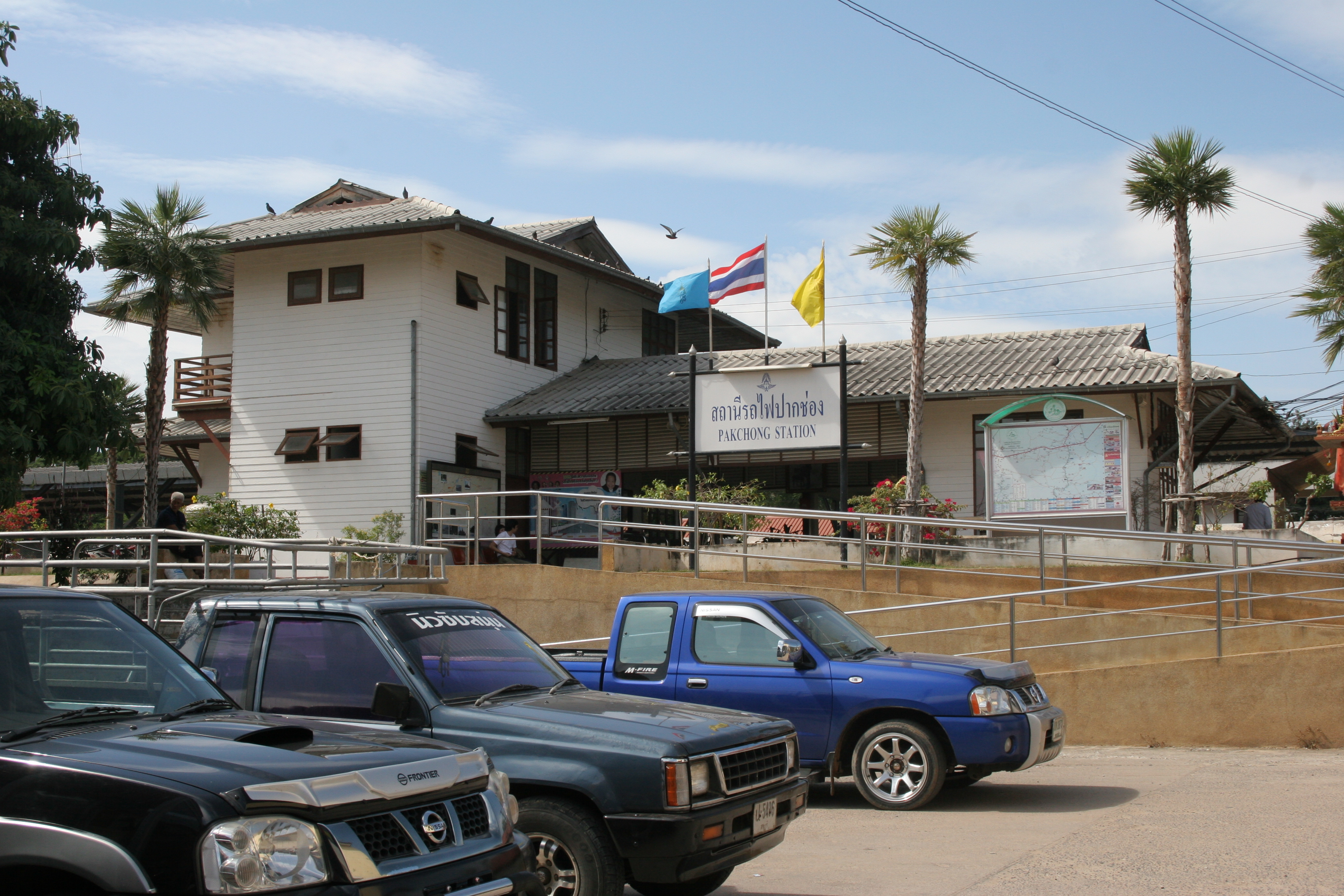 パークチョン駅